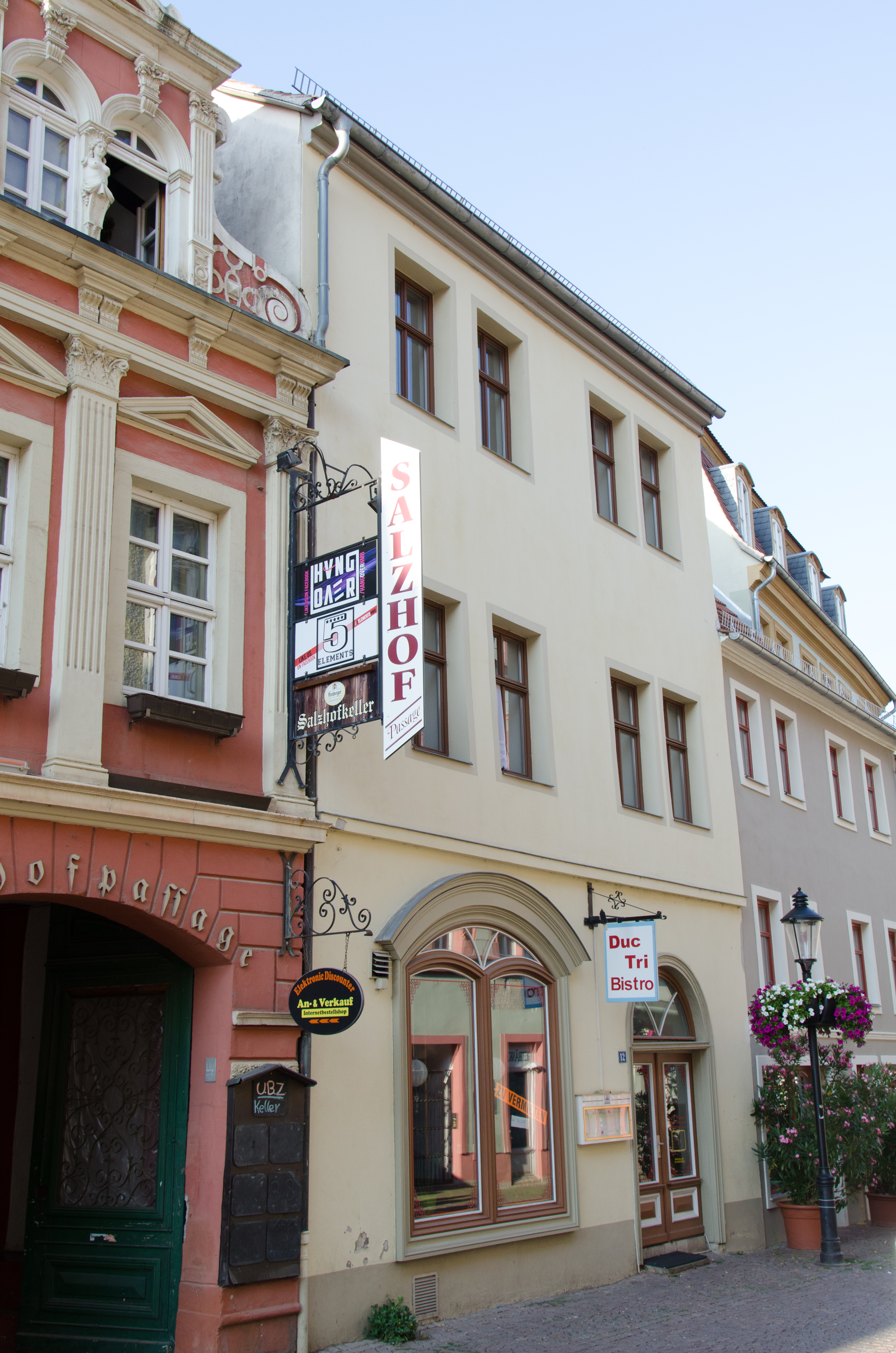 Naumburg, Salzstraße 12